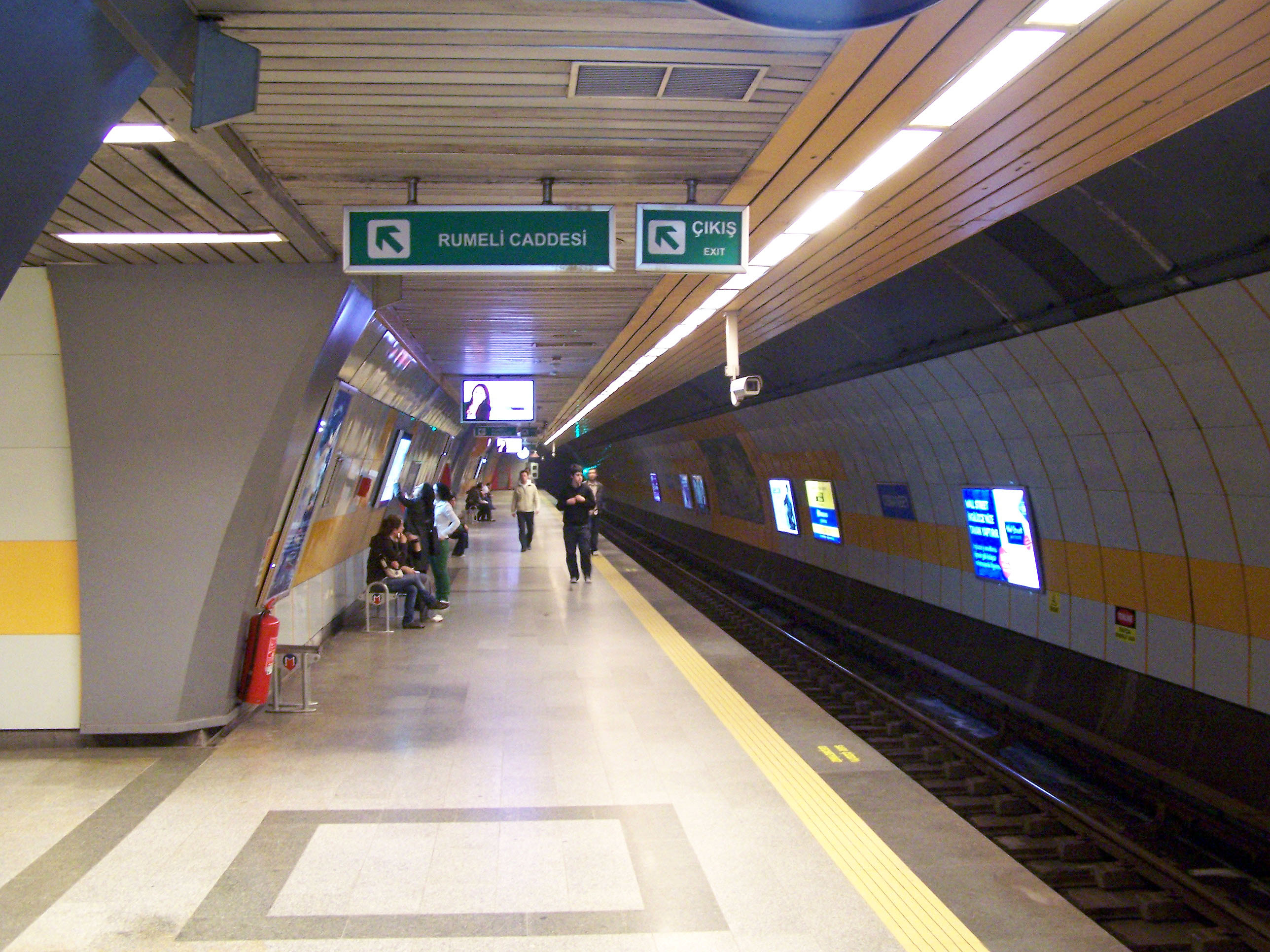 Osmanbey statıon of Istanbul Metro